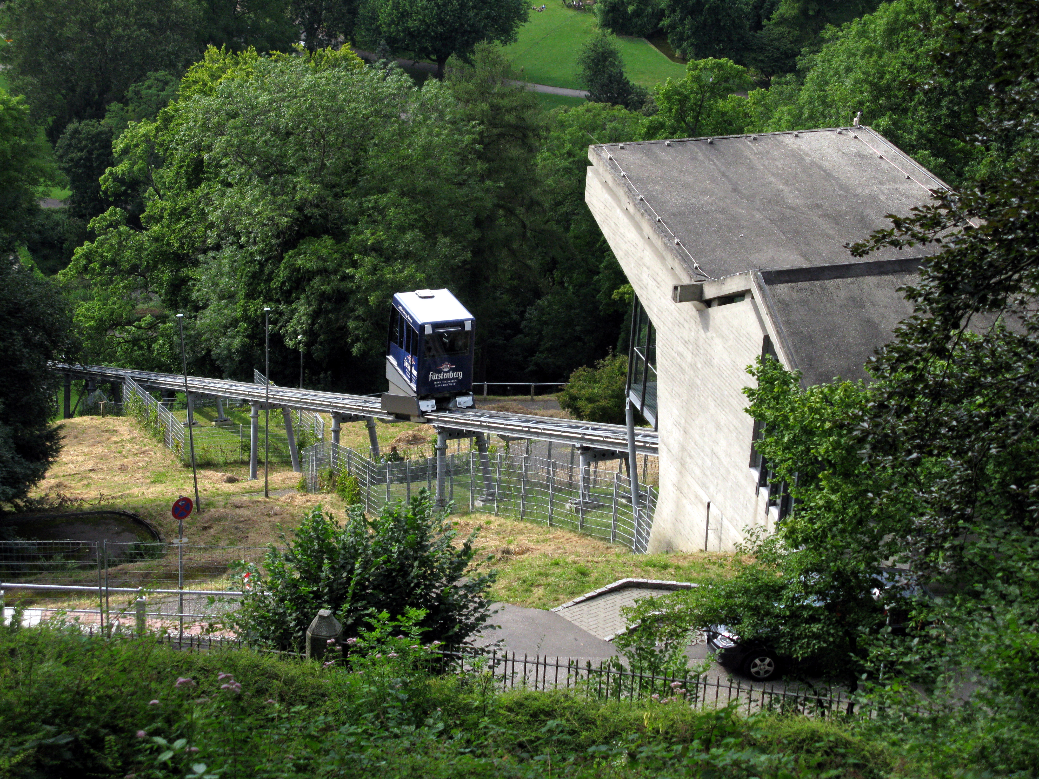 Schlossbergbahn in Freiburg mit Bergstation